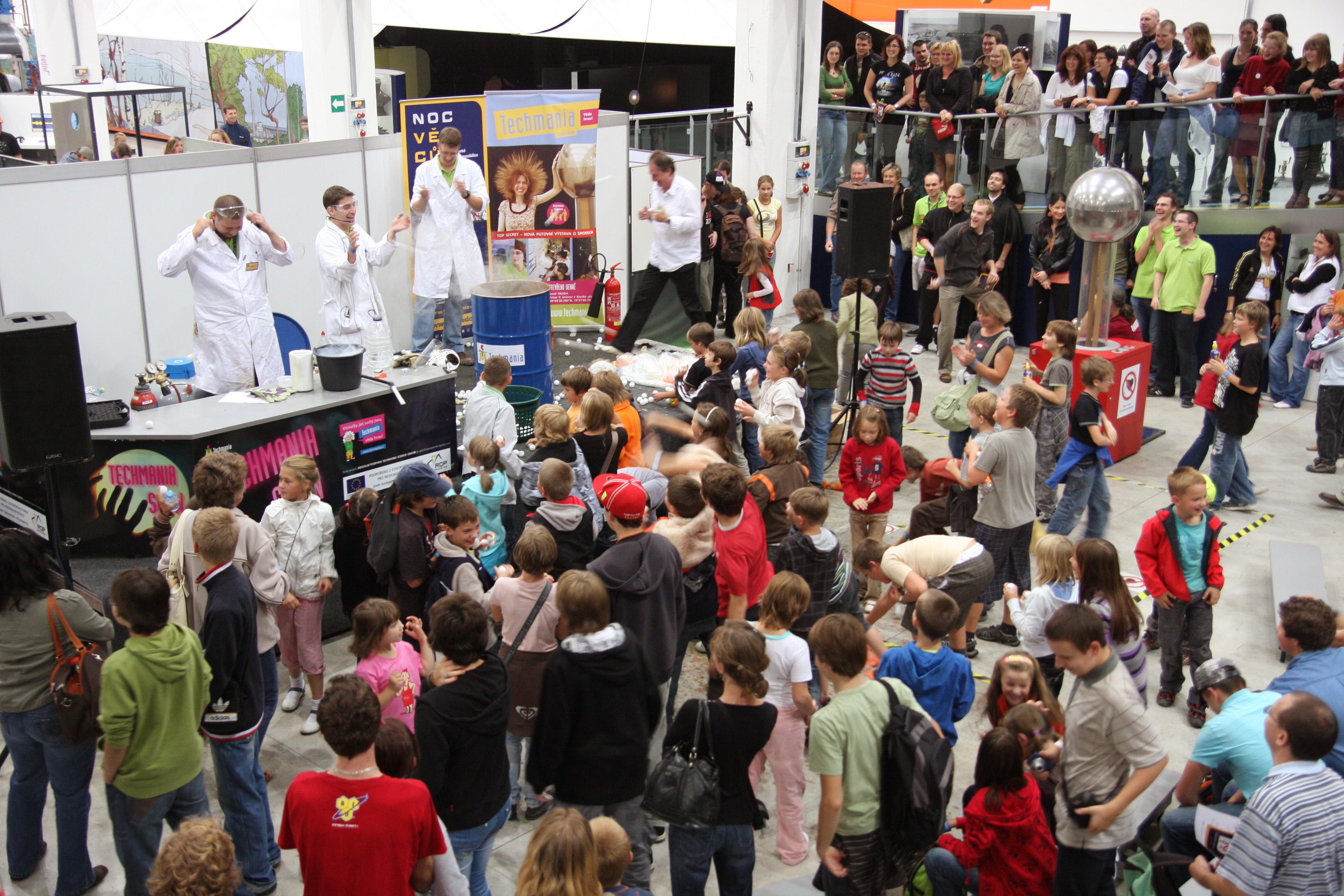 Noc vědců v plzeňském science centru Techmania